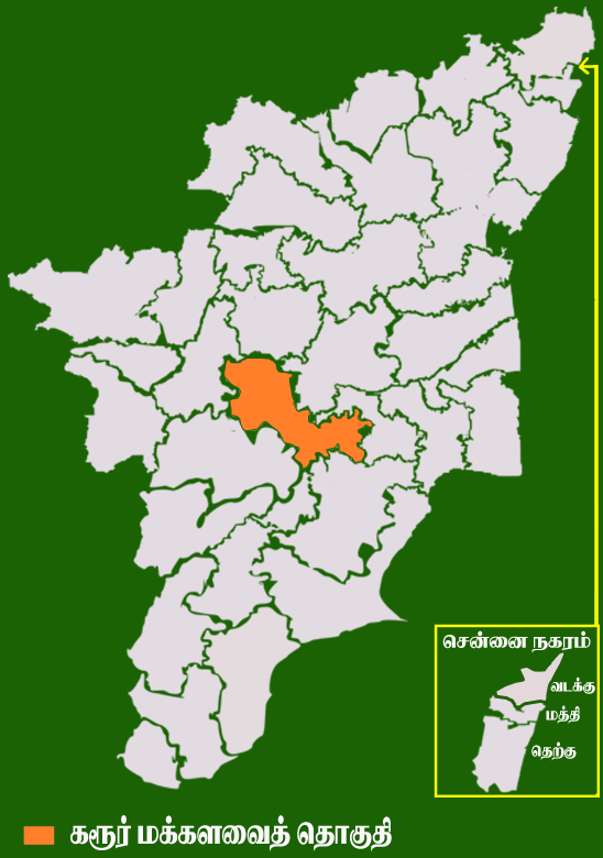 தமிழக வரைபடத்தில் உள்ள கரூர் மக்களவைத் தொகுதி